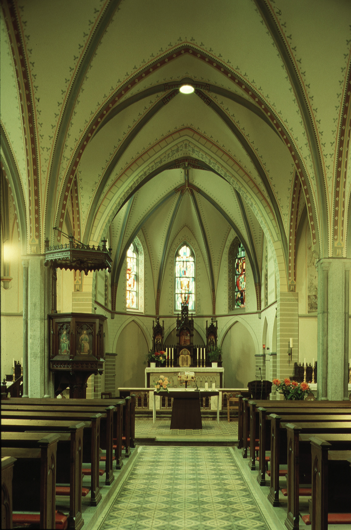 Aachen-Hahn: Kath. Pfarrkirche St. Maria dolorosa, Innenraum nach Osten